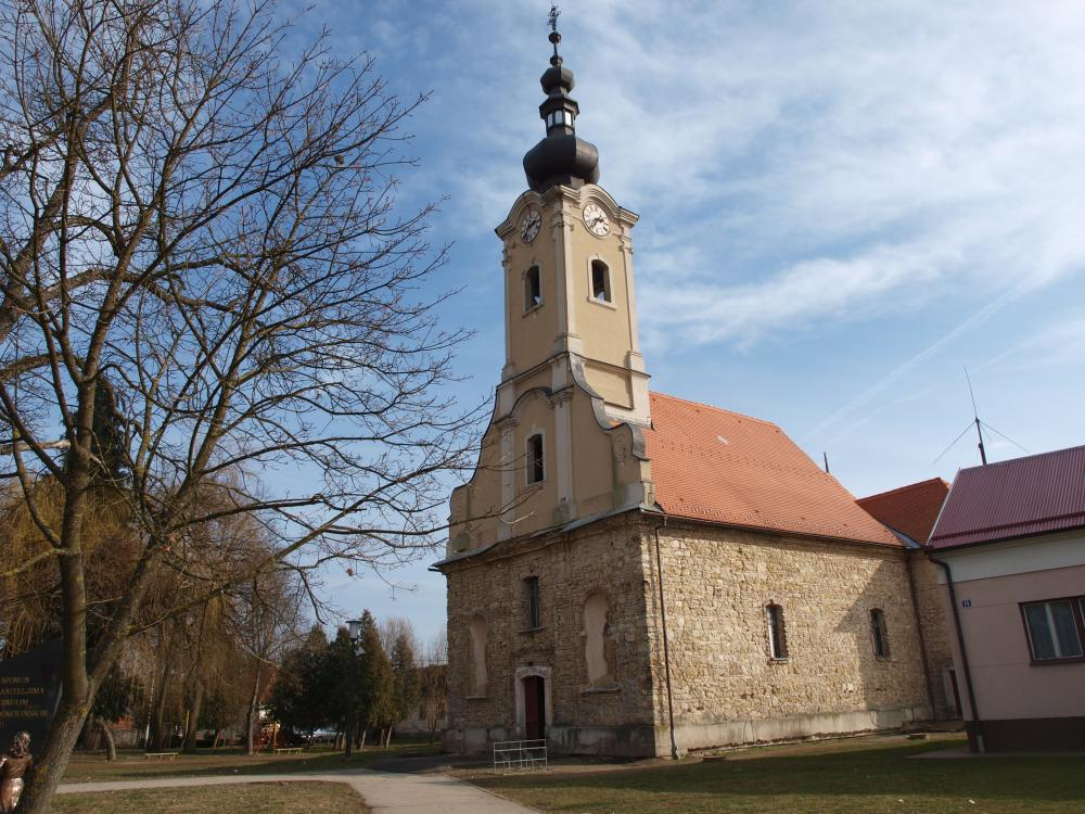 Crkva u Sibinju, Brodsko-posavska županija.